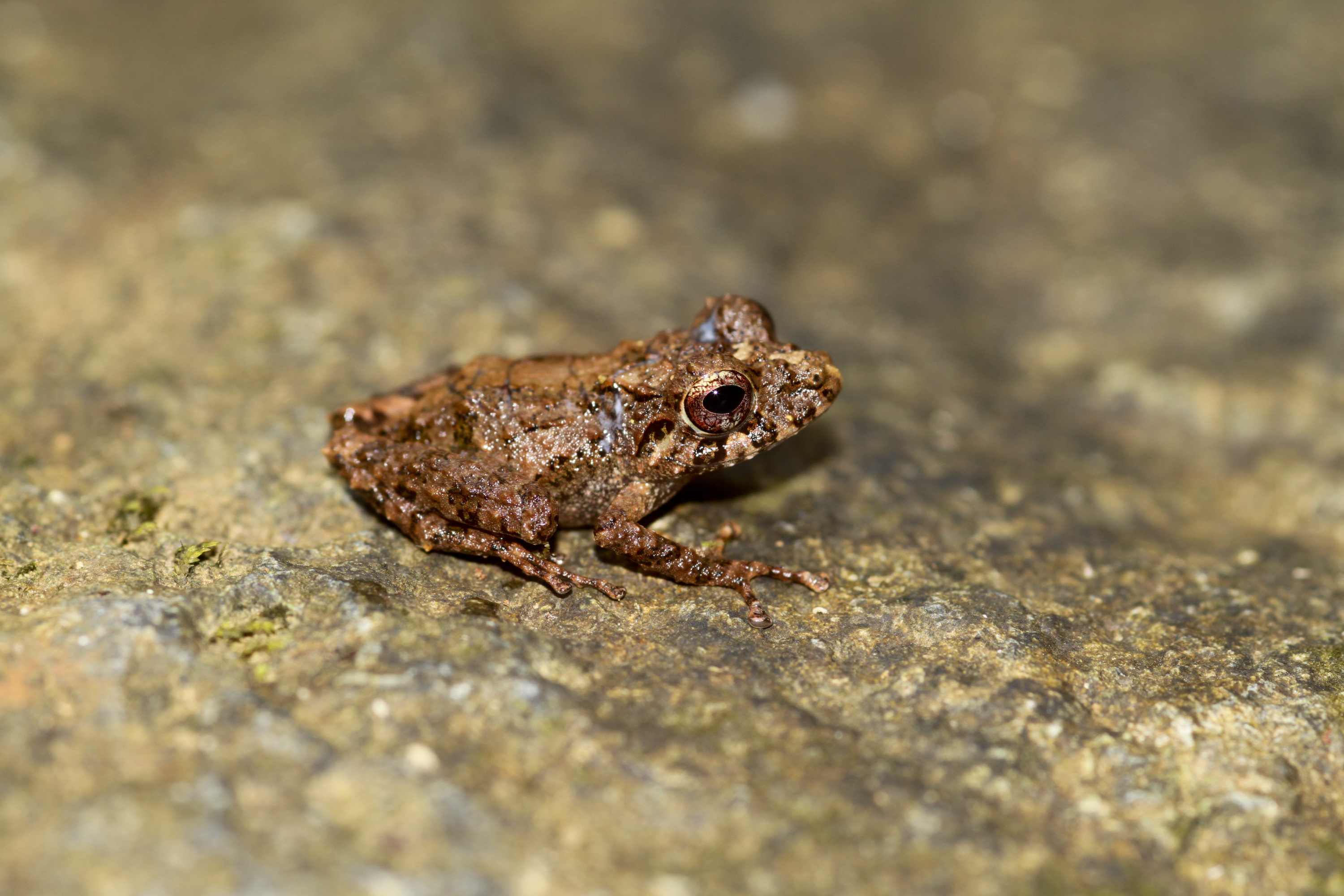 Pristimantis cruentus, Panama